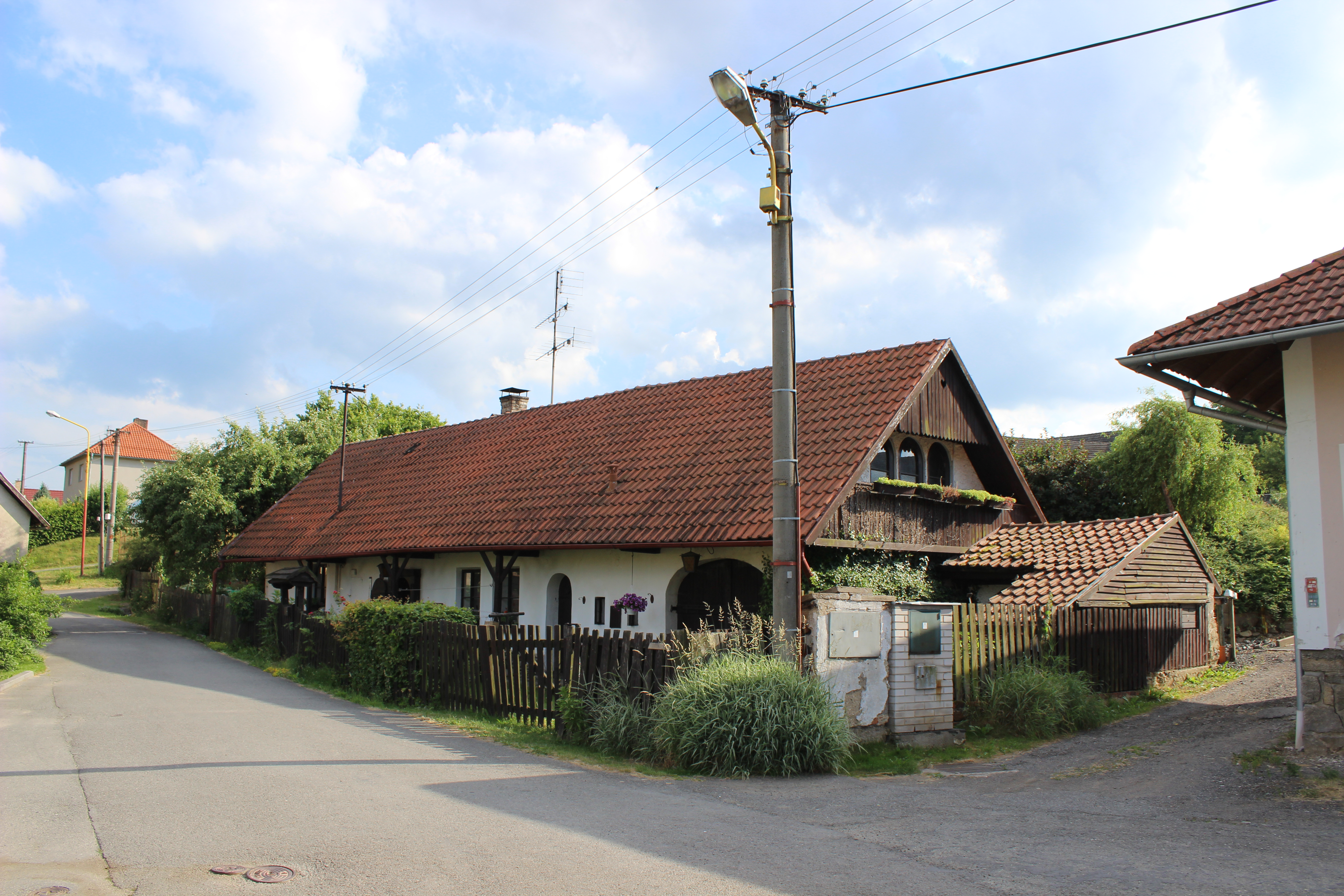 Dům evidenční číslo 6 v Bernarticích v benešovském okrese.